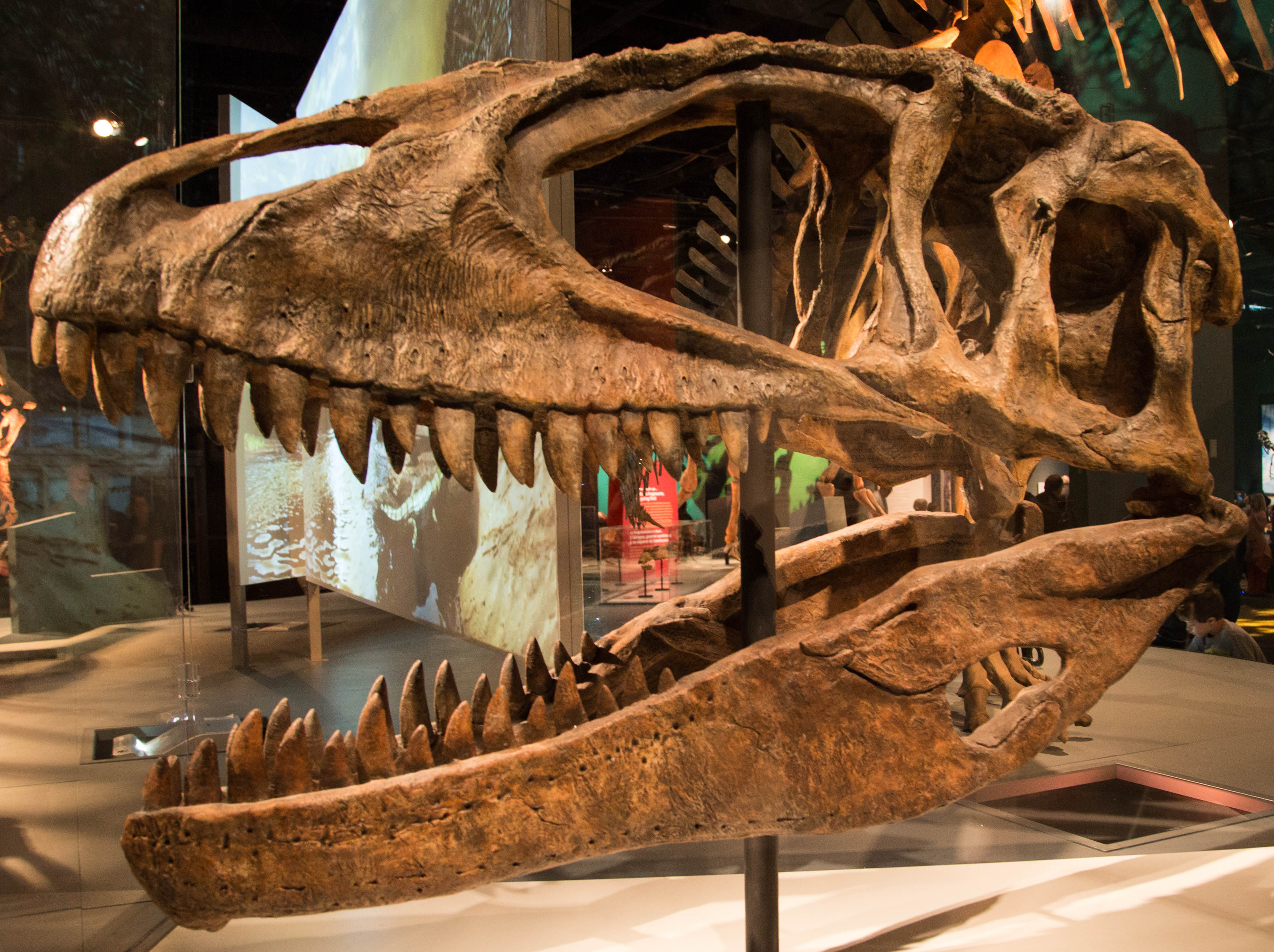 Science Museum - Carcharodontosaurus Skull - 2014